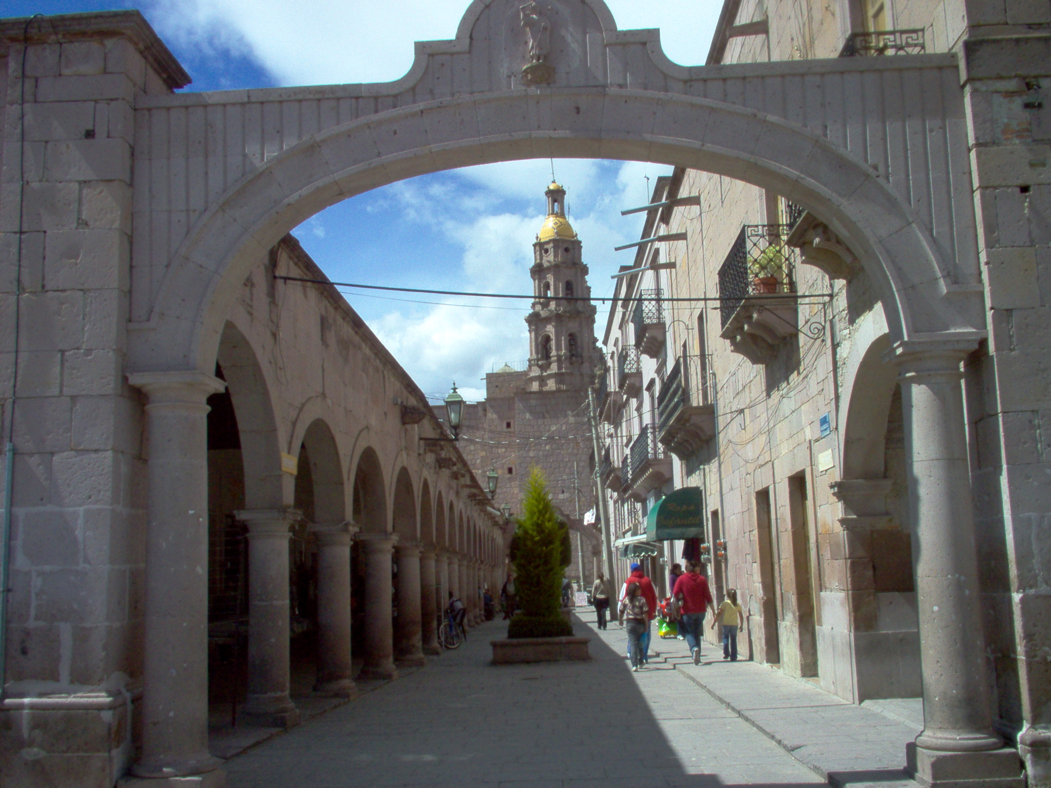 poratal de San Miguel el Alto